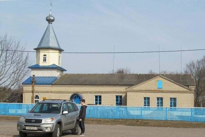 Грэск. Царква